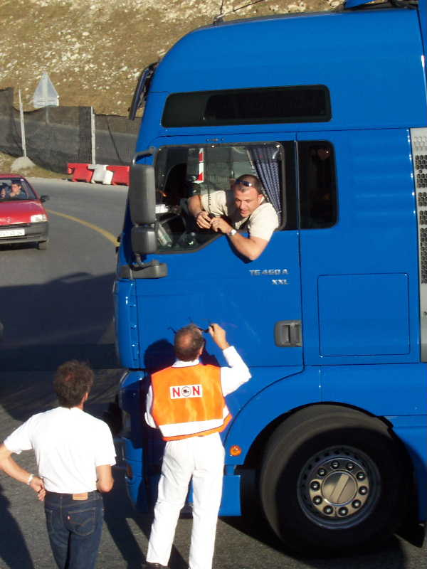 Distribution de tract par un militant de l'Arsmb.